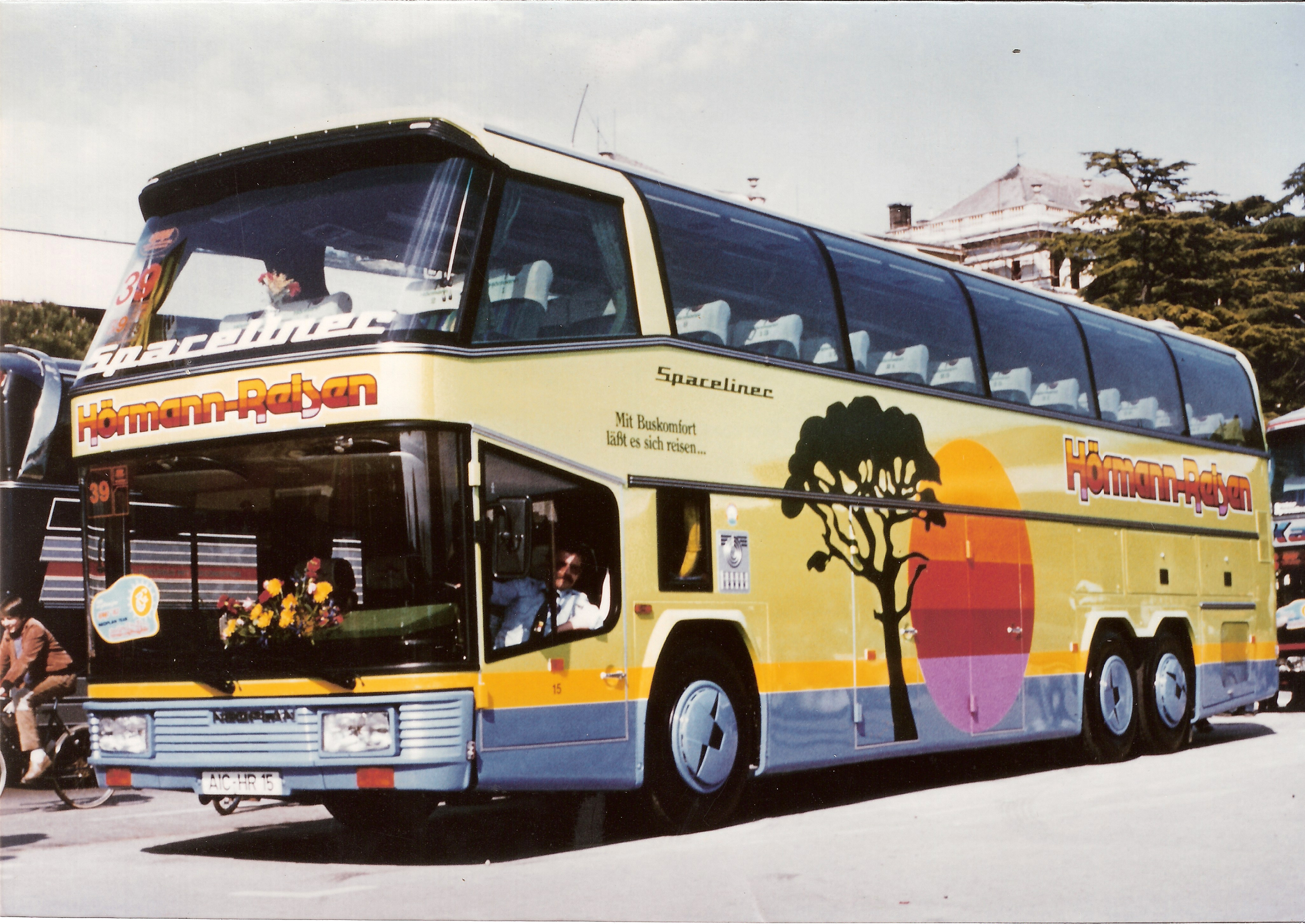 Chronik8 1982 Spacliner